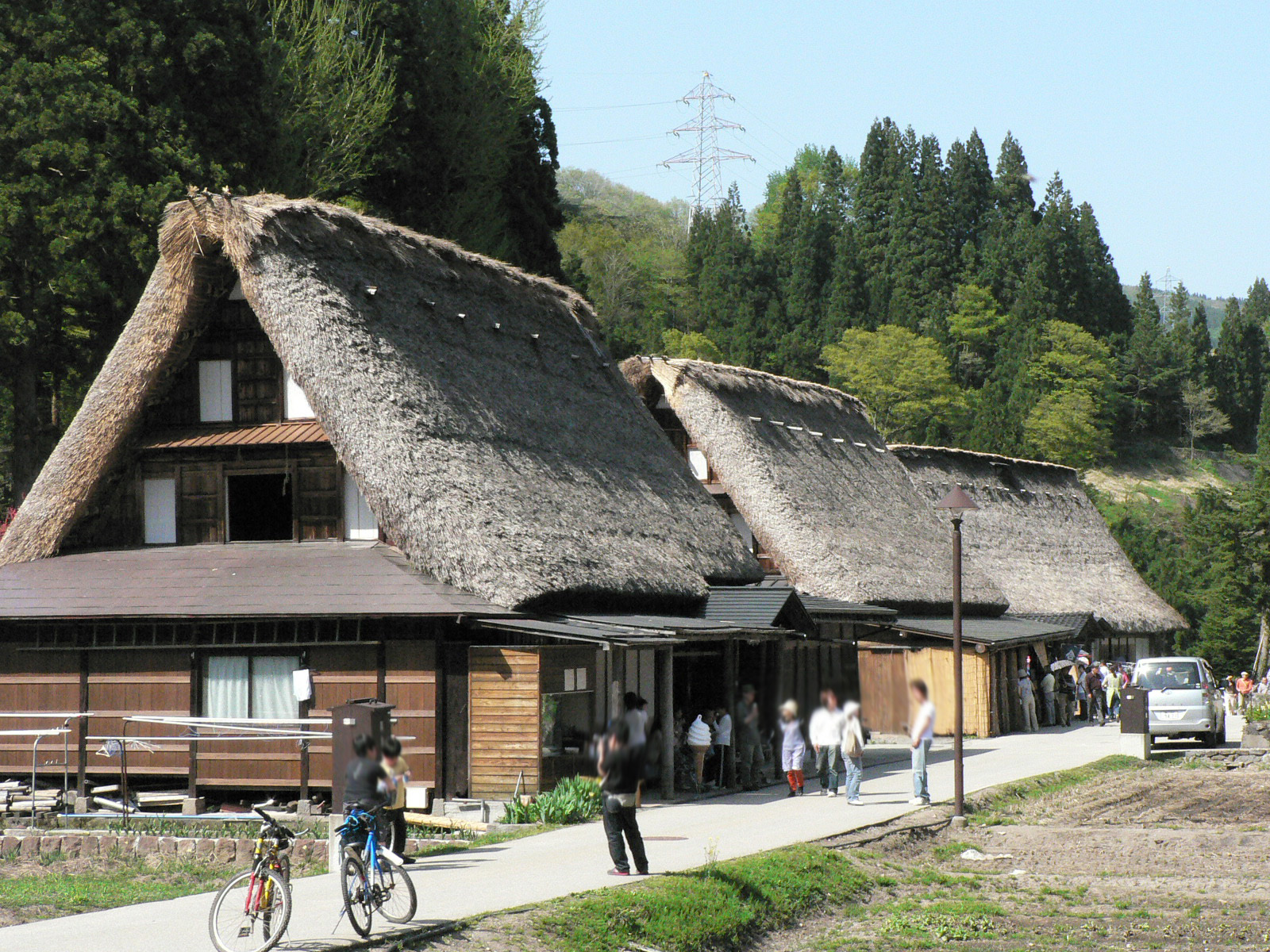 富山県南砺市（旧平村） 越中五箇山 相倉合掌集落